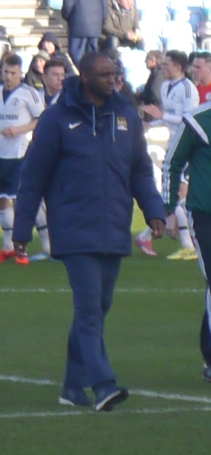 Patrick Vieira avec Manchester City le 24 février 2015